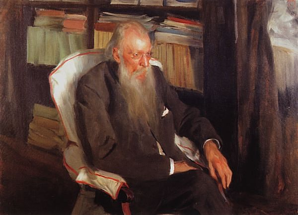 Портрет Д.Л.Мордовцева